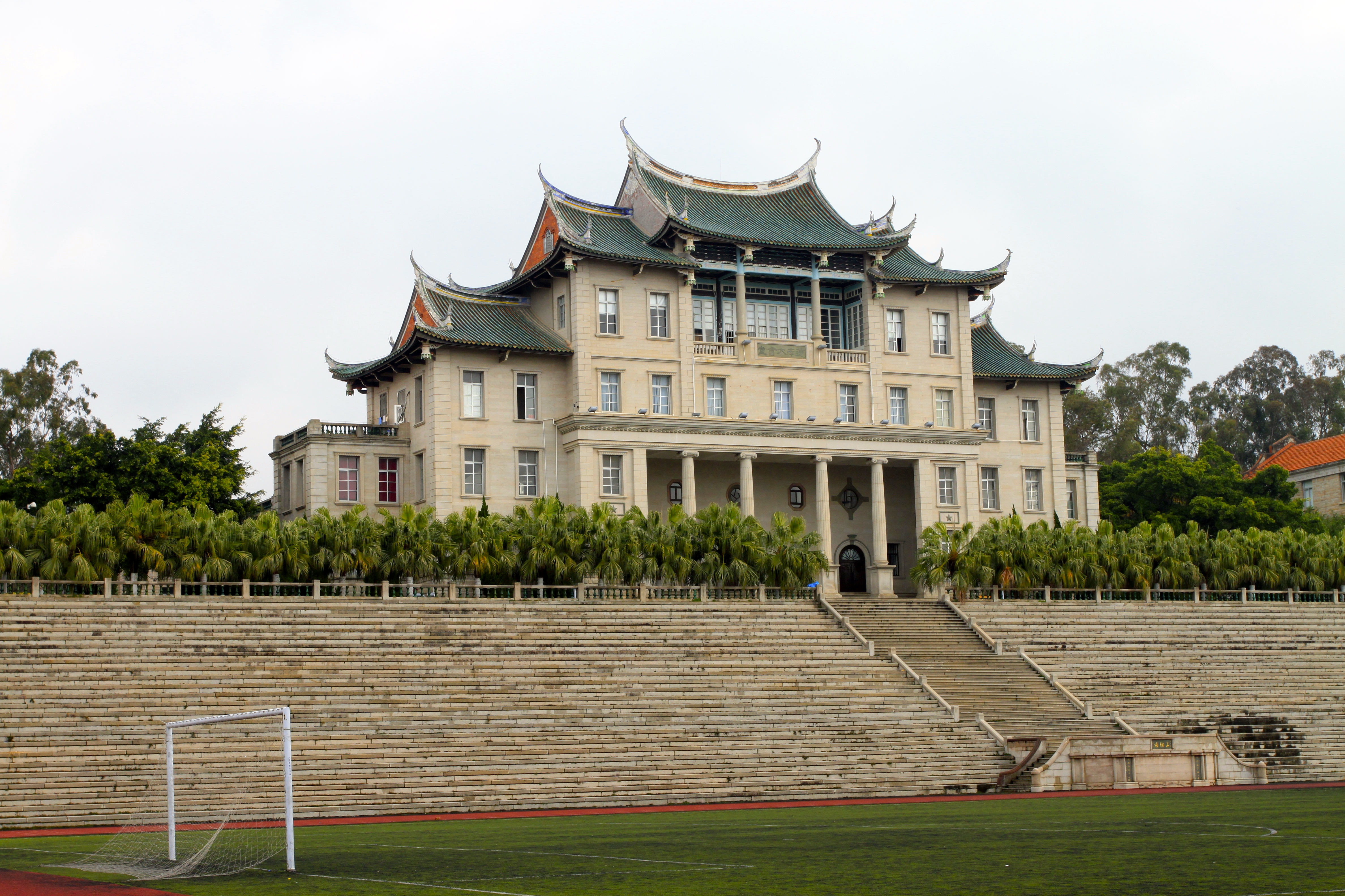 厦门大学建南楼群